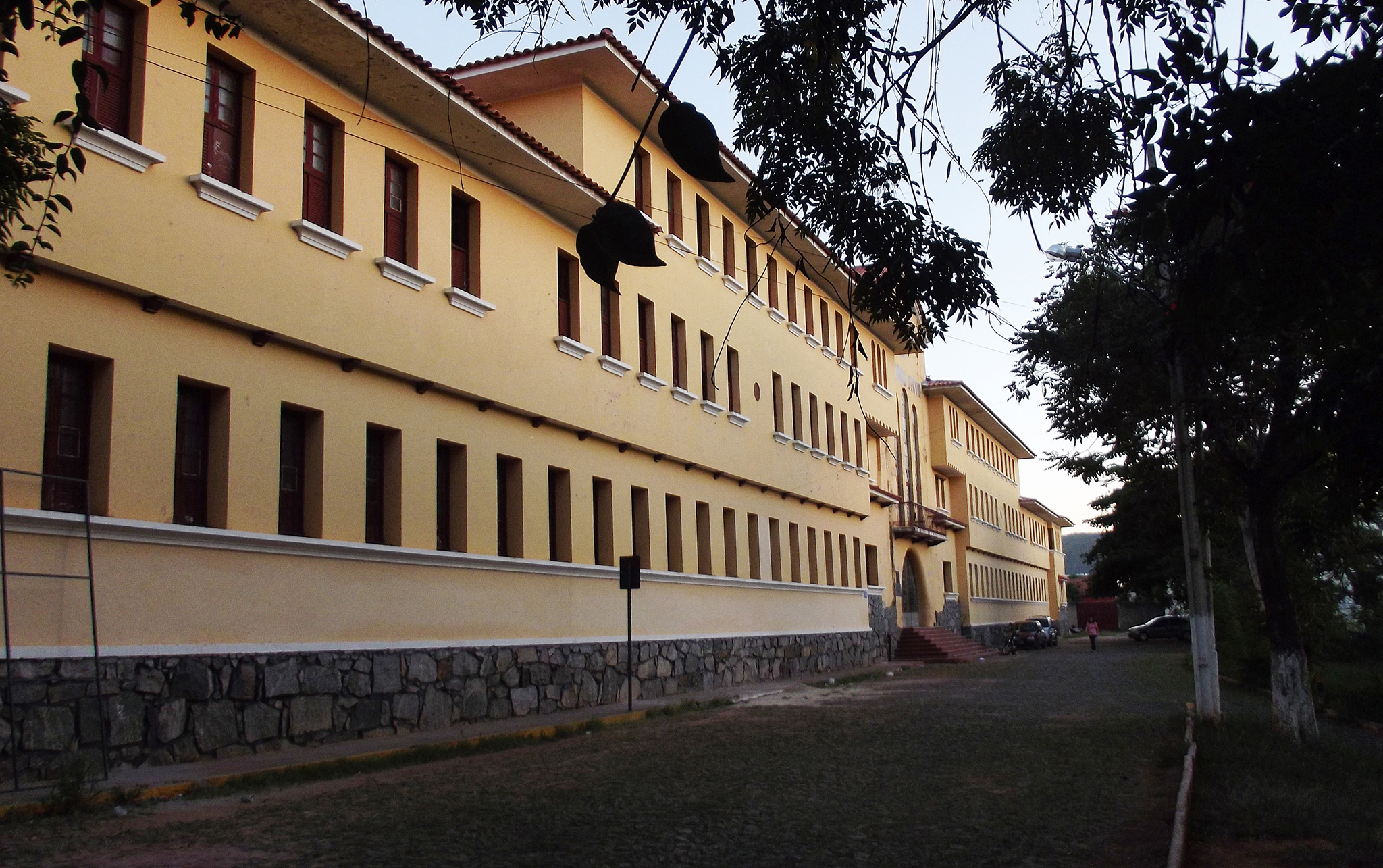 Imagem da Escola Estadual Fernando Otávio, localizada na cidade de Pará de Minas.